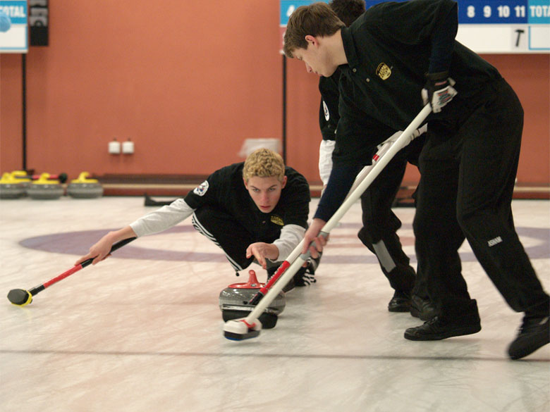 Tým Savona 4 - První liga